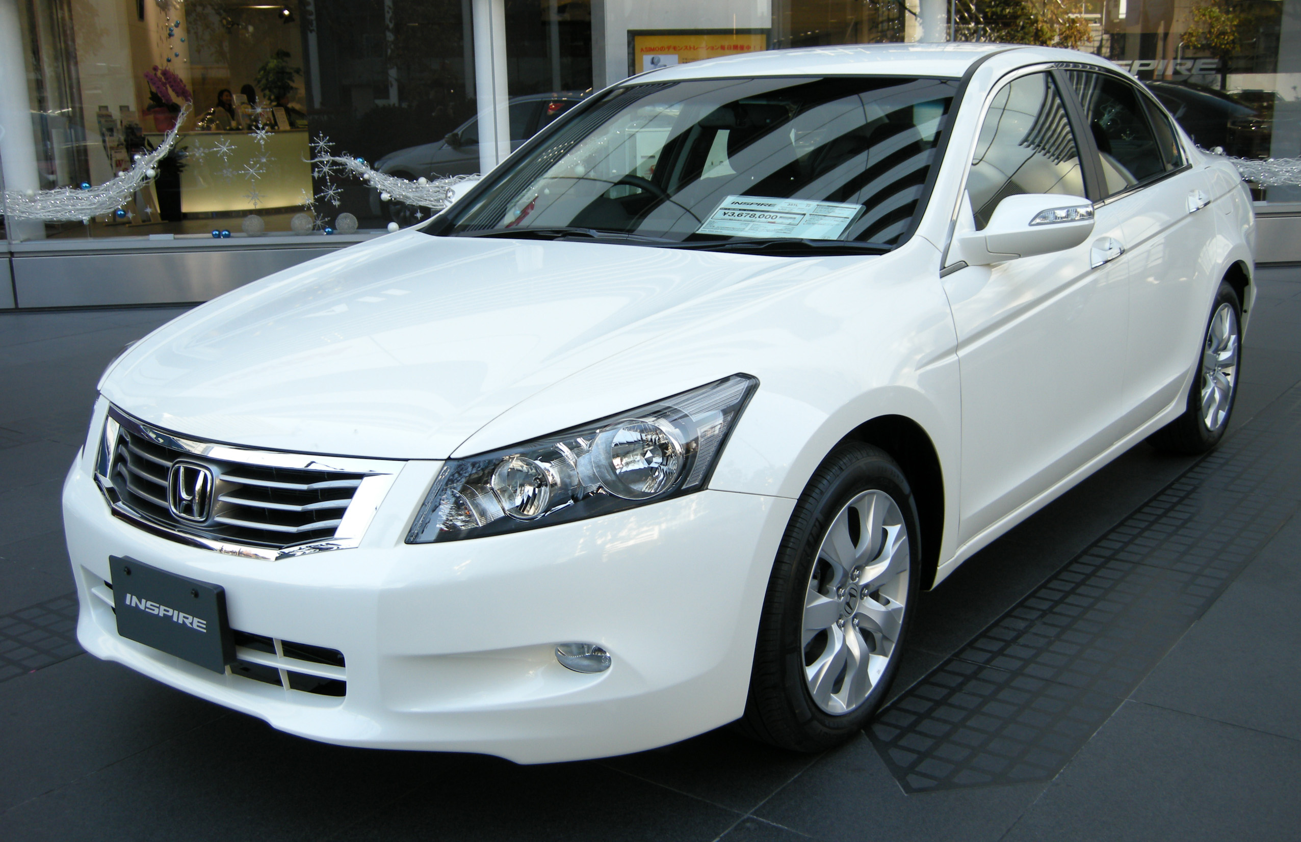 2008 Honda Inspire in Honda Welcome Plaza Aoyama (Minato, Tokyo)